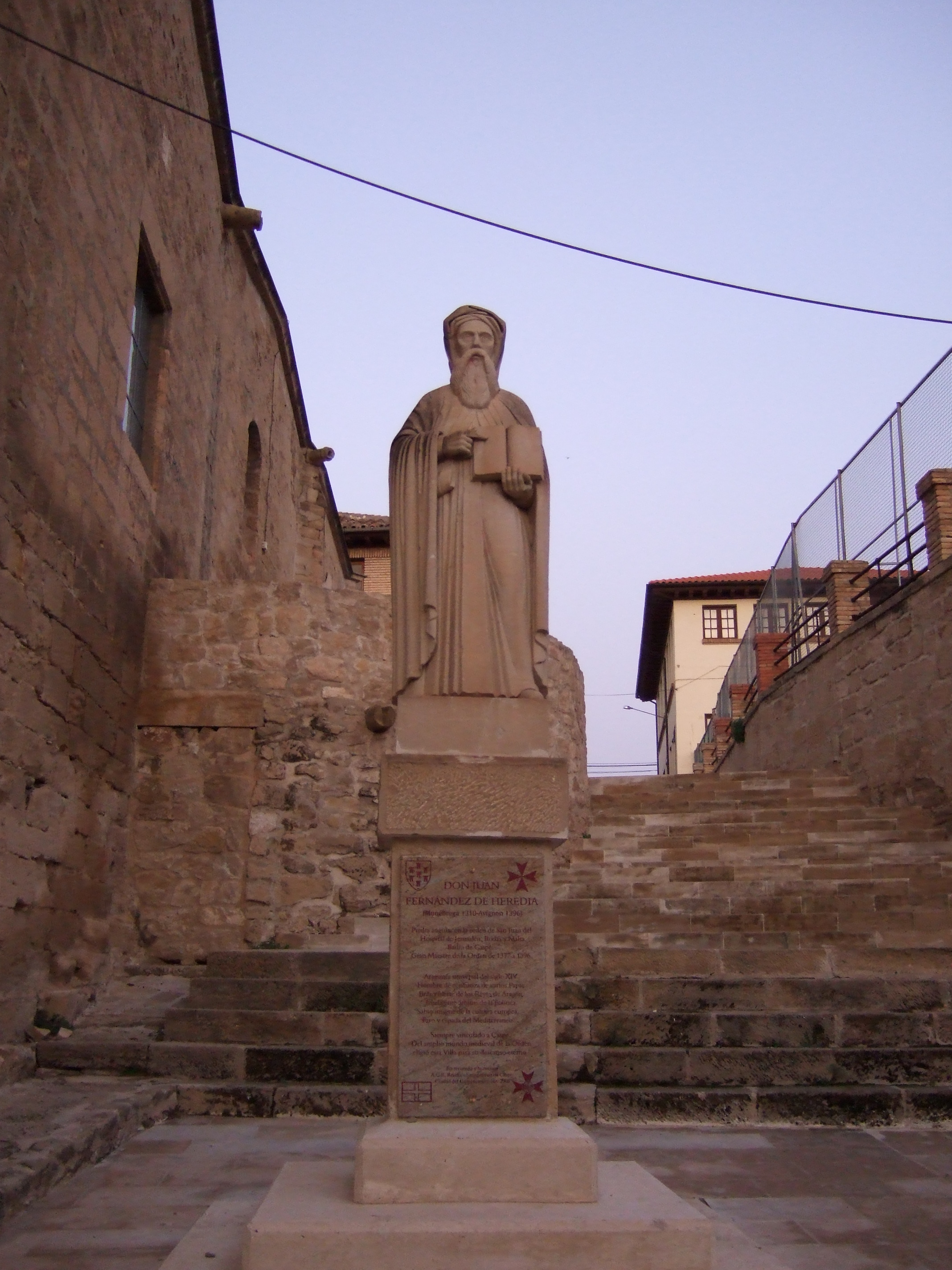 Caspe - Monumento Juan Fernández de Heredia (Munébrega 1310-Avignon 1396). Texto al pie: "Piedra angular de la orden de San Juan del Hospital de Jerusalén, Rodas y Malta, Bailio de Caspe, Gran Maestre de la Orden de 1377 a 1396. Aragonés universal del siglo XIV. Hombre de confianza de varios papas. Brazo fuerte de los Reyes de Aragón. Inteligente arbitro de la cultura europea. Faro y espada del Mediterráneo. Siempre vinculado a Caspe. Del amplio mundo medieval de la Orden eligió esta Villa para su descanso eterno. En recuerdo y homenaje. A.C.R. Resaka - Sanjuanistas de Caspe Ciudad del Compromiso ano 2008."